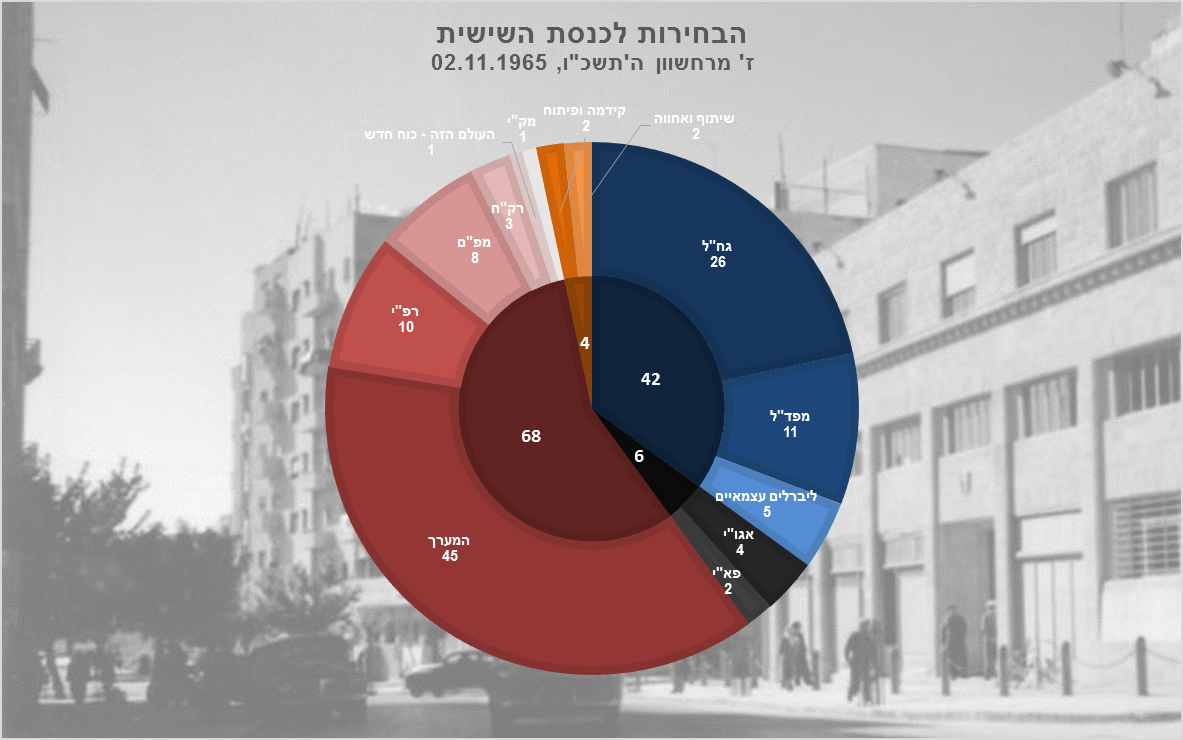 תוצאות הבחירות לכנסת השישית